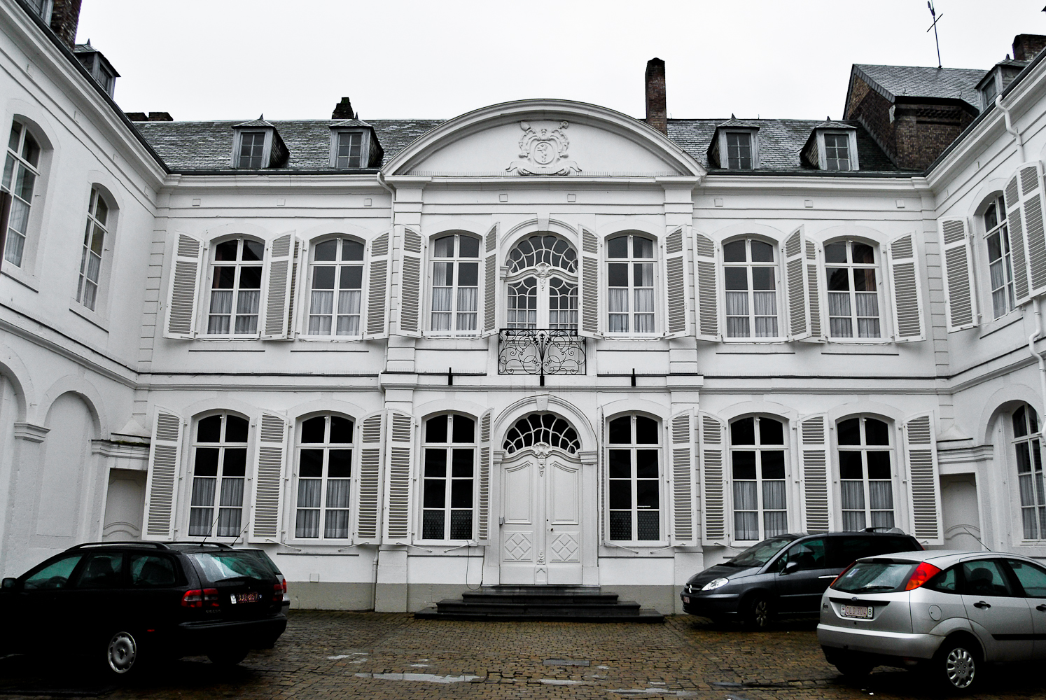 Ancien Evêché actuellement Gouvernement Provincial